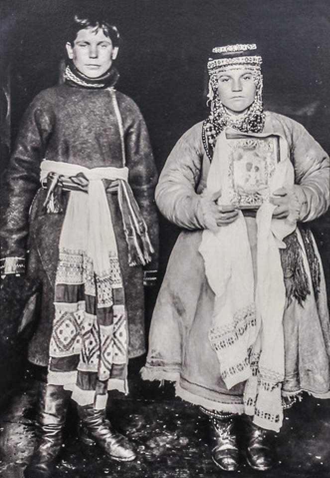 Жених и невеста. Орловская губерния, Брянский уезд, 1908 г. Фото Н. П. Красникова. РЭМ. Коллекция 1319-10